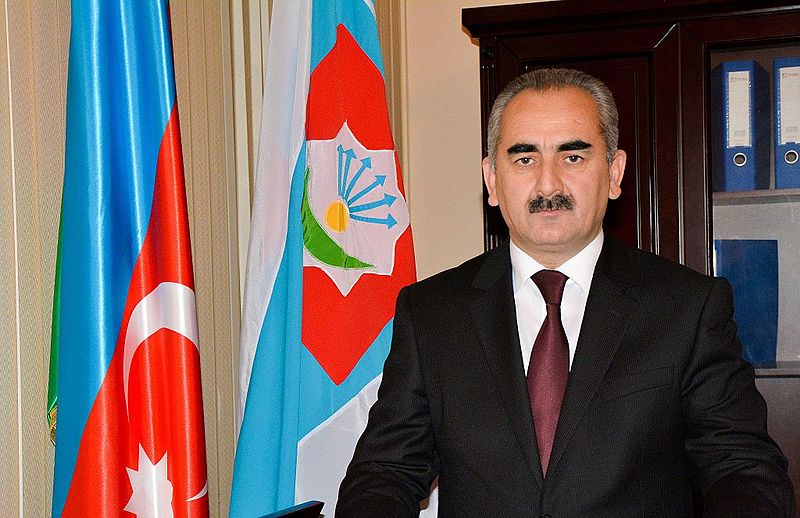 Əlisahib Vəli oğlu Hüseynov (d.13 fevral 1970, Qubadlı, Azərbaycan) — Demokratik Azərbaycan Dünyası Partiyasının (DADP) sədri.